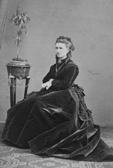 Елизавета Константиновна Рихтер (1841—1916)